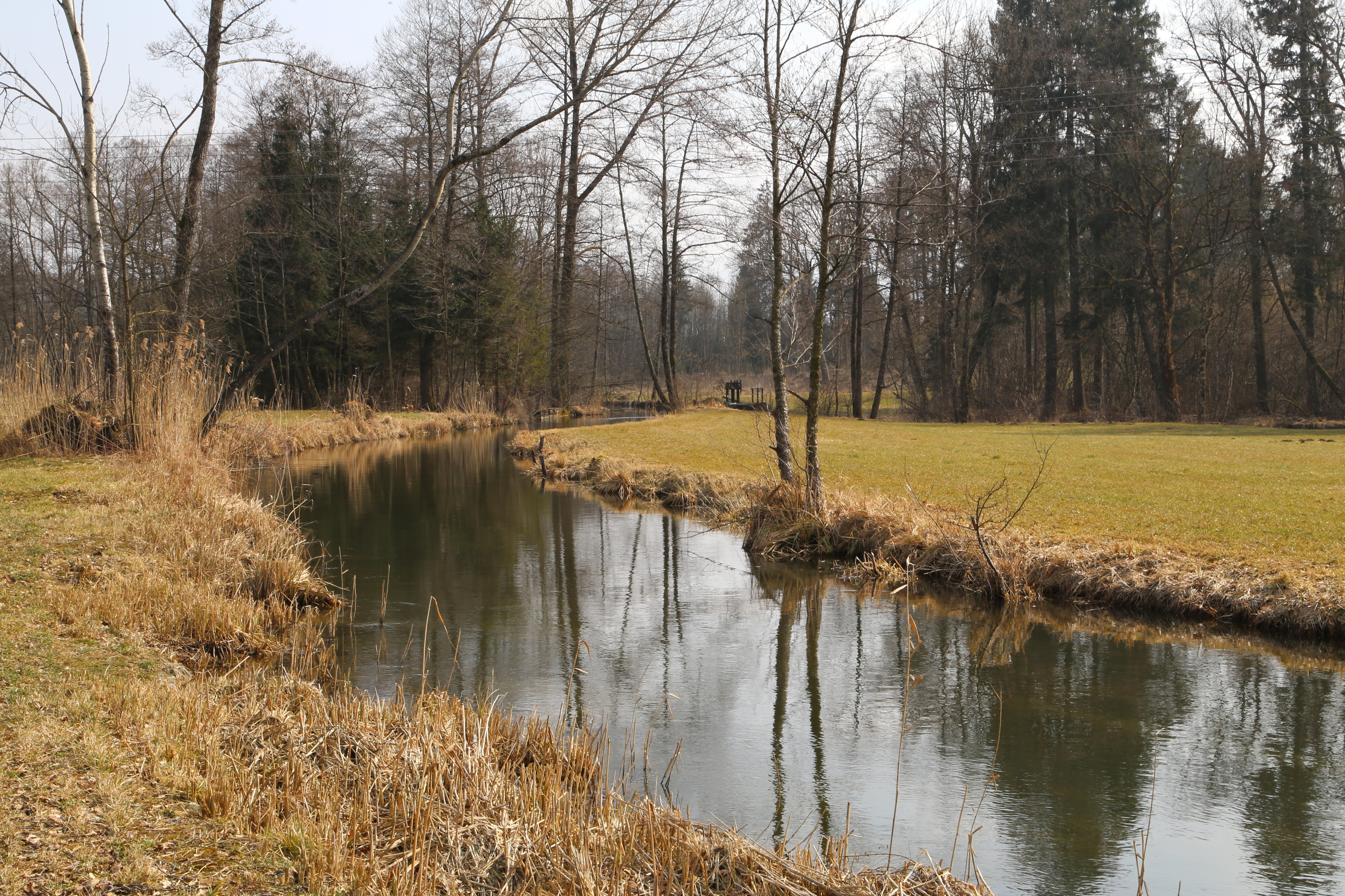 Sims in der Nähe der Krottenhausmühle, Stephanskirchen